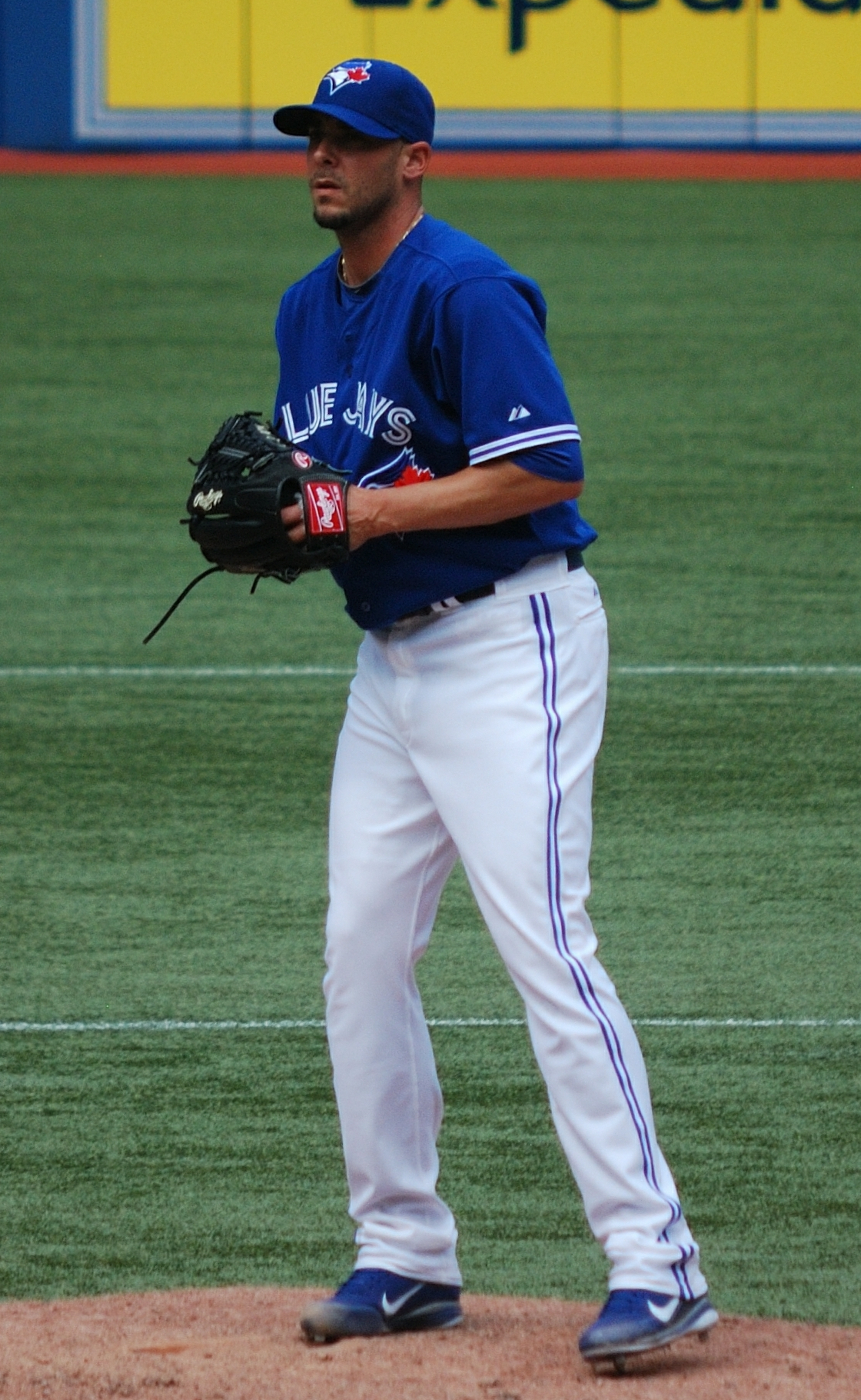 David Pauley